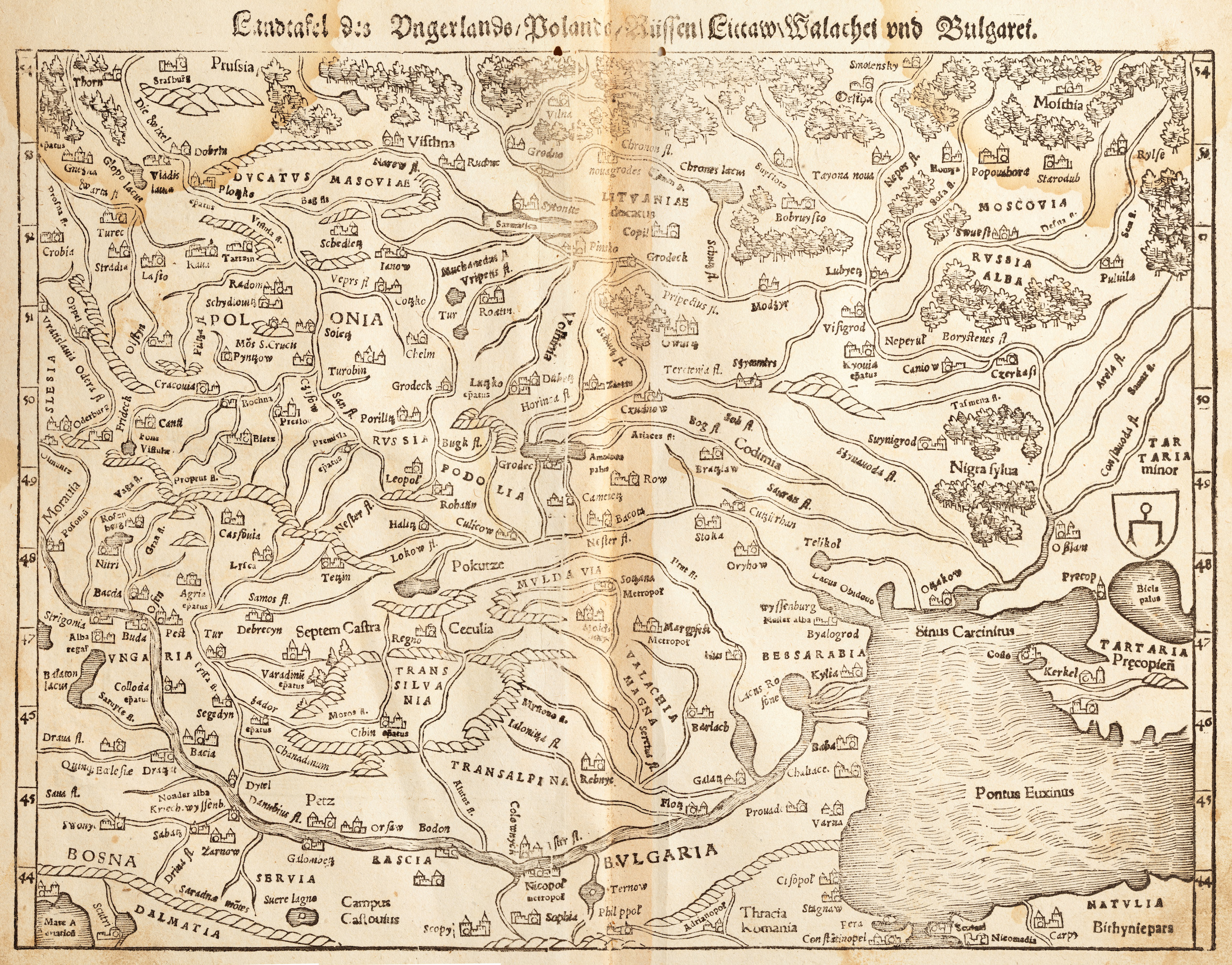 Landtafel des Ungerlands/Polands /Reuffen/Littaw/Walachei/Burgarei, Sebastian Munster (Basle, 1550) Одна з карт східної Європи з «Космографії» Себастьяна Мюнстера. Представлений примірник швидше за все датований 1550 р. Це одне з перших джерел, де західноукраїнські землі позначені як «Русь» [Rvussia], а на північному сході від Києва позначена Біла Русь [Rvussia Alba], і вже далі на схід – Московія [Moscovia].